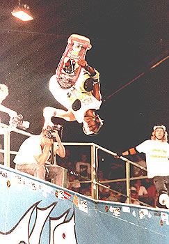 Indy, Sergio de Paulo, Münster Monster WK 1987 Foto door Hans Lucas